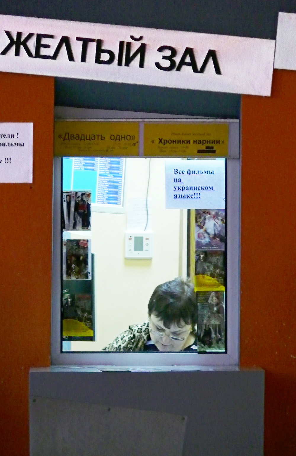 Kino "Park" in Kharkov